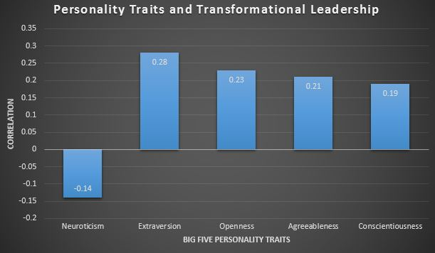 특징과 그 영향 시각화